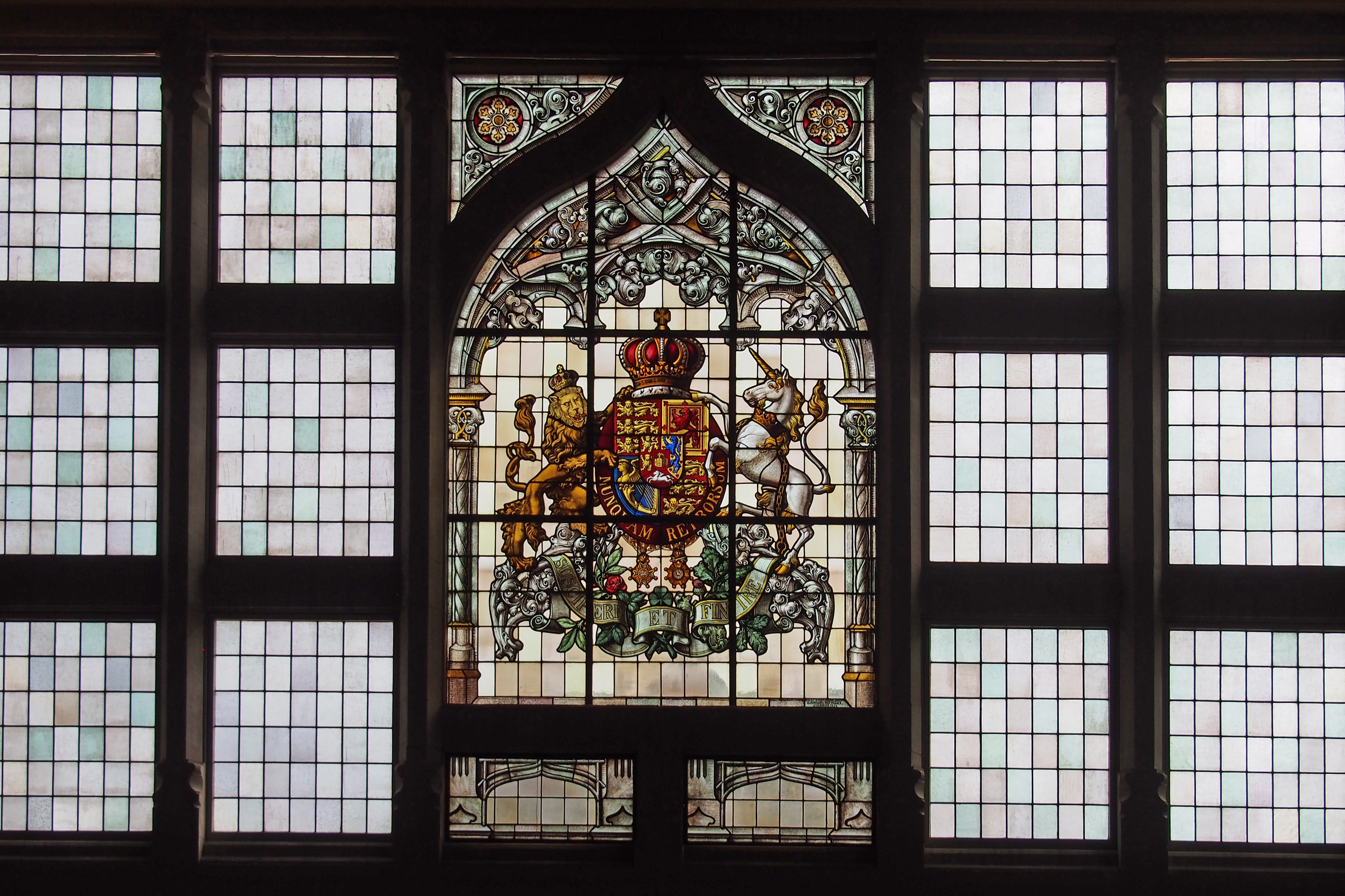 Wappenfenster an der Außenseite der Ehrenhalle der hannoverschen Armee im Bomann-Museum Celle, mit dem Wahlspruch des Königs Ernst August I.: Suscipere et finire, lat., = Unternehmen und zu Ende führen!